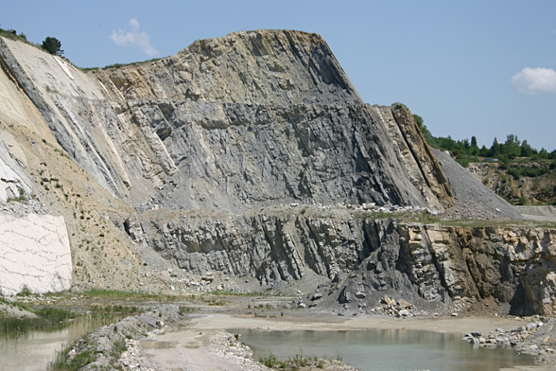 Steinbruch Langenberg. Steilgestellte Schichten des Jura.